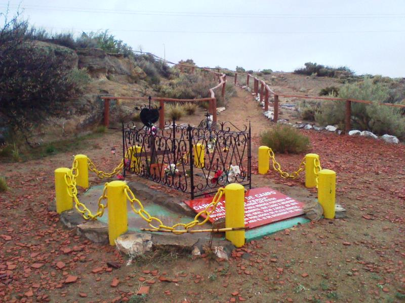 Tumba de Carmen Funes La Pasto Verde en la localidad de Plaza Huincul, Neuquén.